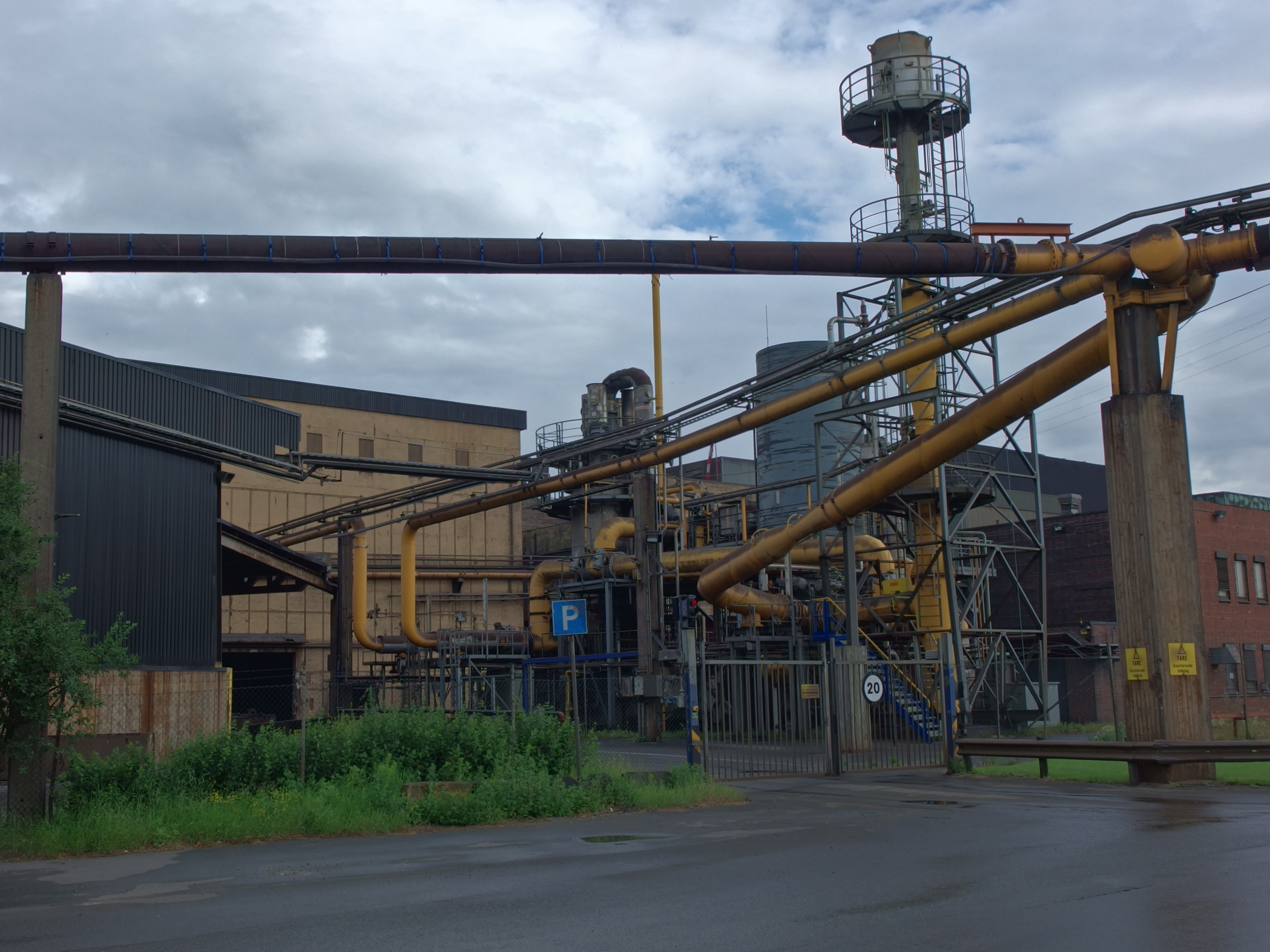 Deler av Eramet sitt anlegg på Herøya Industripark i Porsgrunn.